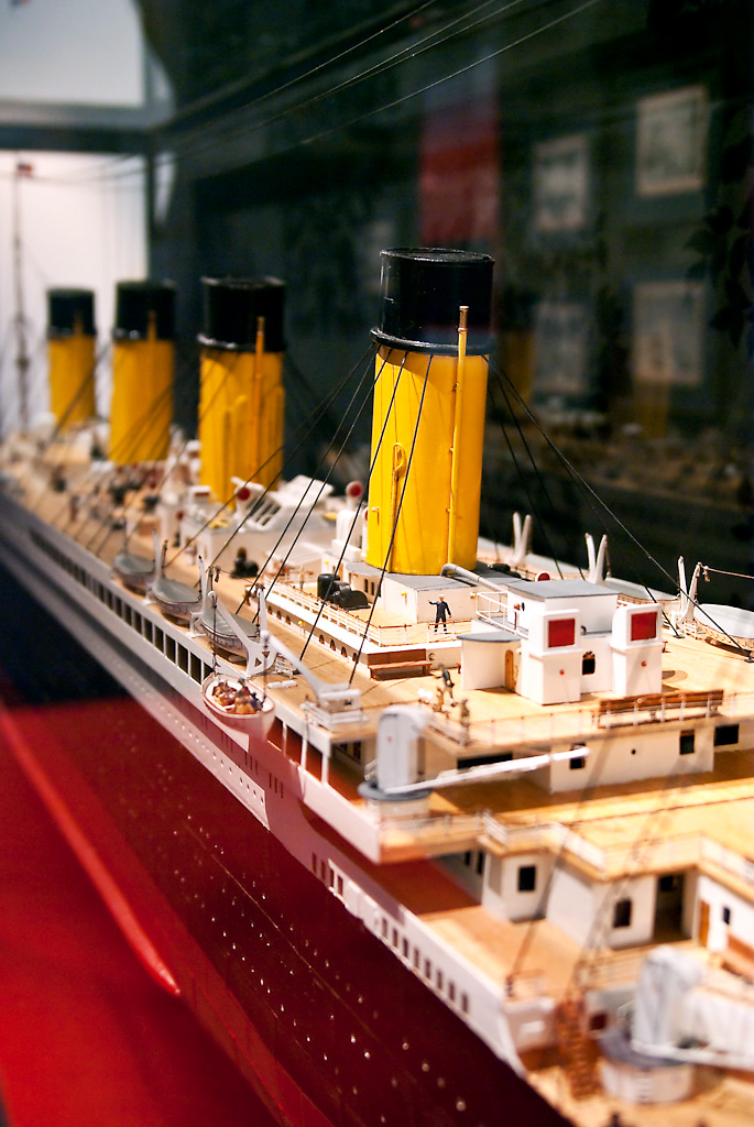 Scheepsmodel van de ‘Titanic’ (Glamour op de golven)